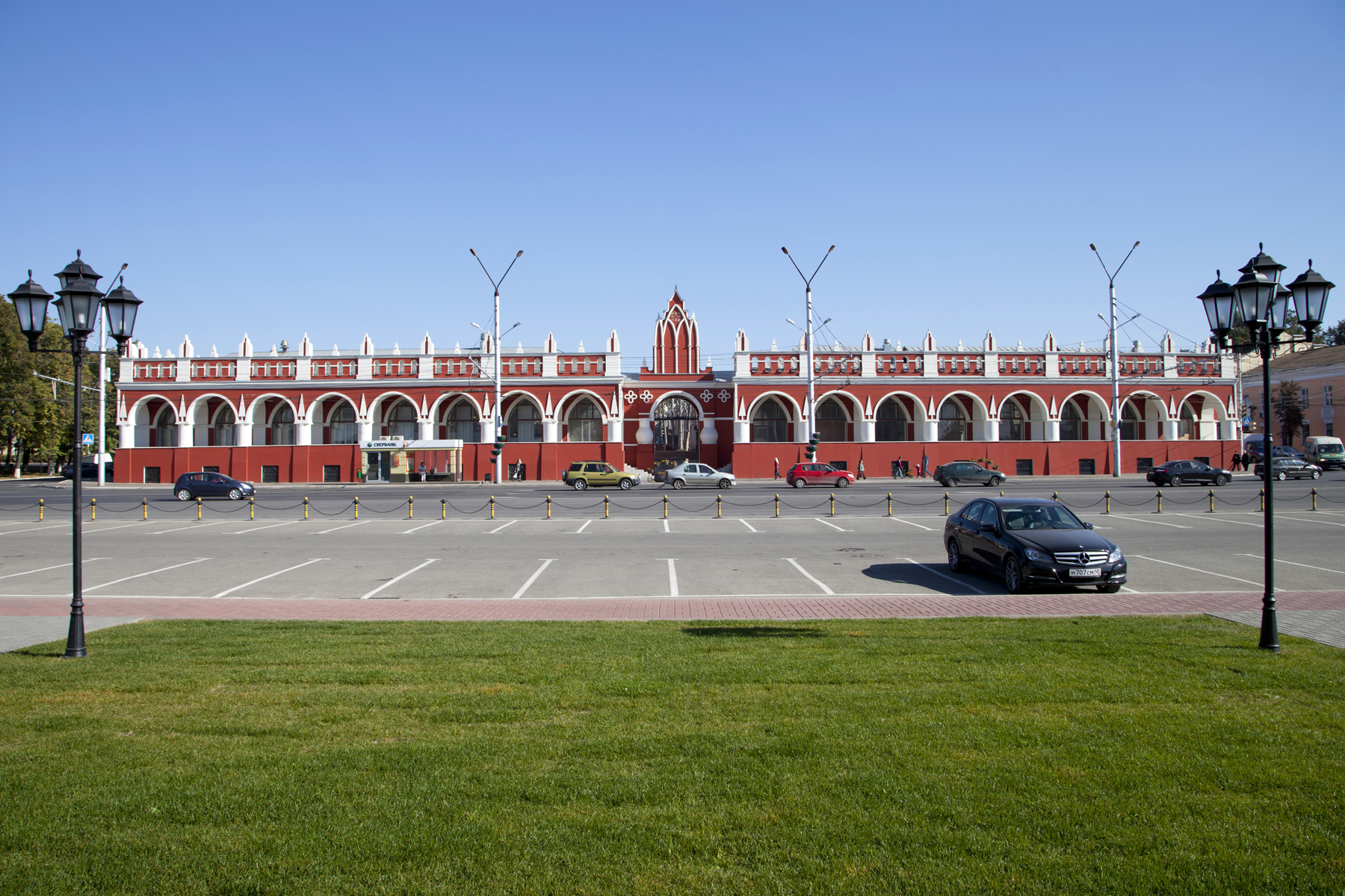 Ансамбль Гостиного двора (четырнадцать корпусов) (Калужская область, Калуга, Ленина ул., 108, 110, 112, 114, 116, 118, 120, 122, 124, 126, Старый Торг пл., Гостинорядский пер., 12, 13, 14, Карпова ул., 12)